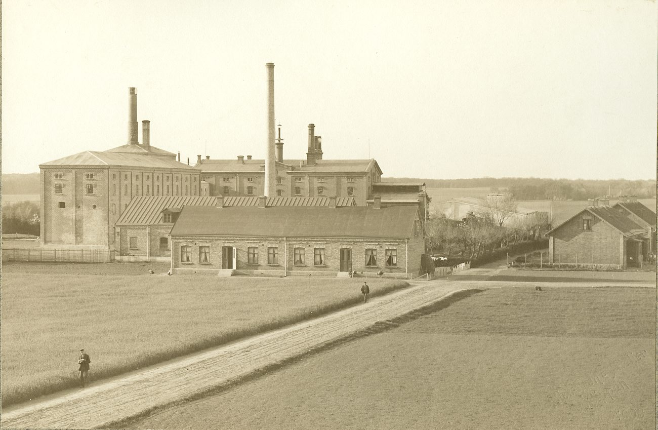 DIG91685. Klippans Ångbryggeri. Fotografiet är skänkt till Tekniska museet från Svenska Turistföreningen.